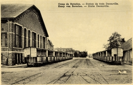 Camp de Beverlo - Station de Train Decauville